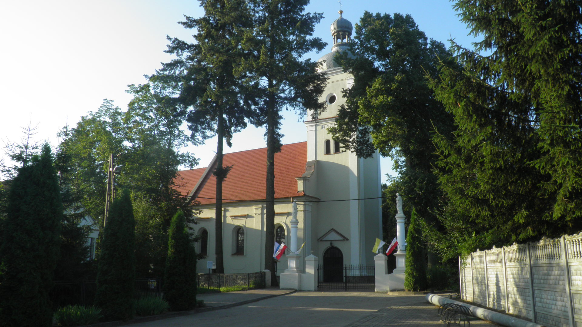 Kościół w Morzewie 2017 rok